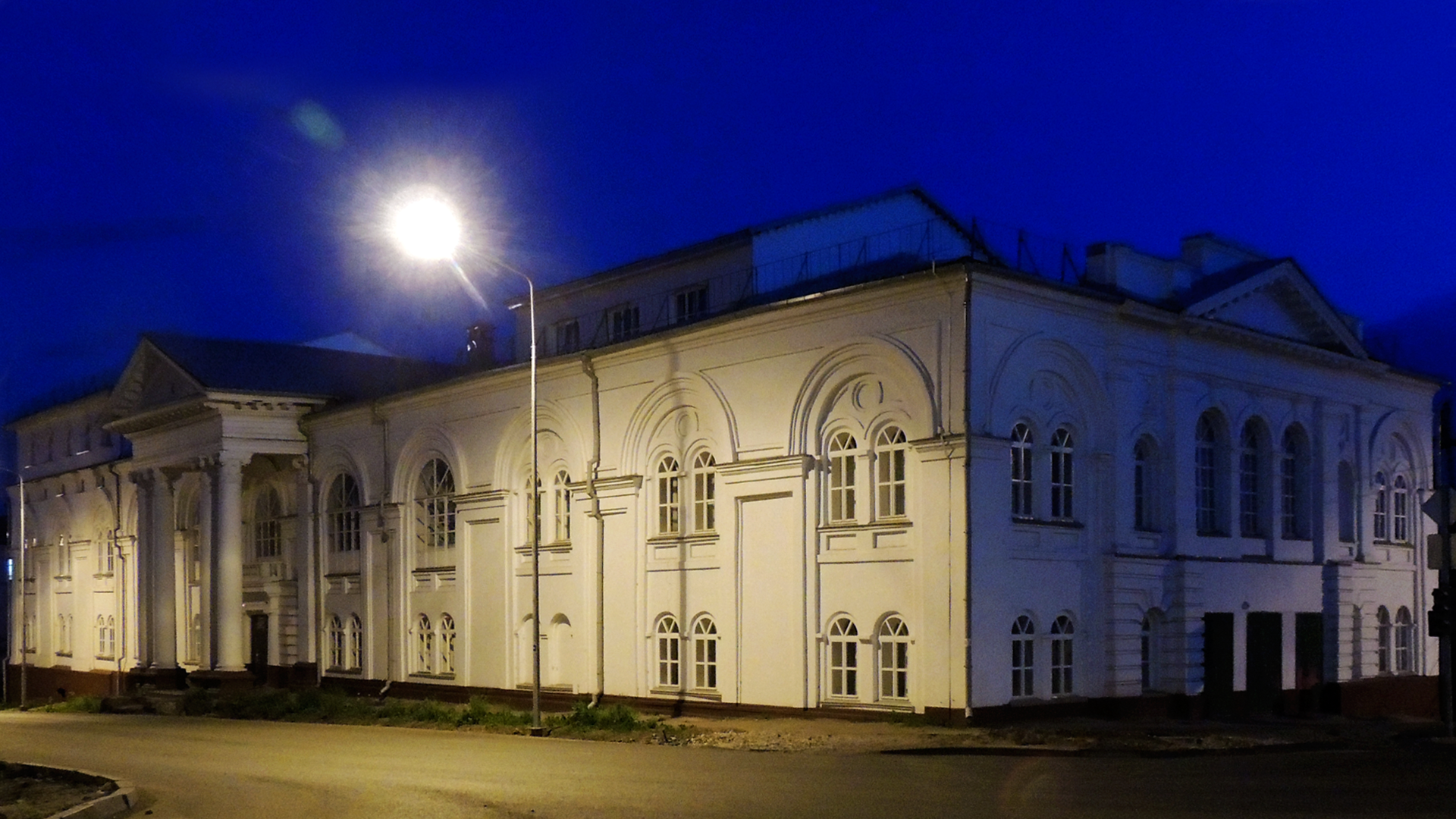 Корпус торговых рядов (сейчас Районный дом народного творчества): улица Карла Маркса, Яранск, Яранский район, Кировская область